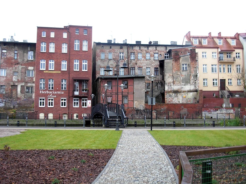 Na Wyspie Młyńskiej w Bydgoszczy